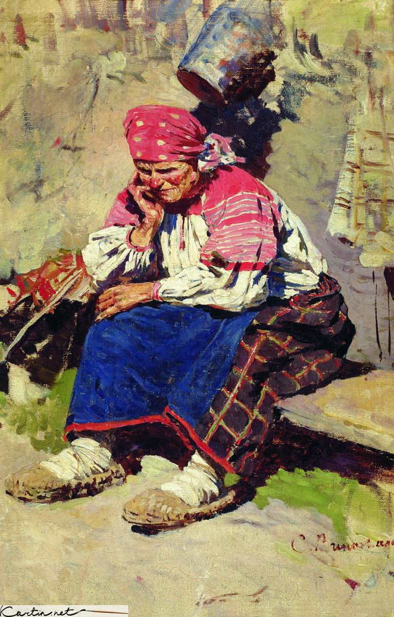 Баба Холст, масло Национальный художественный музей Республики Саха